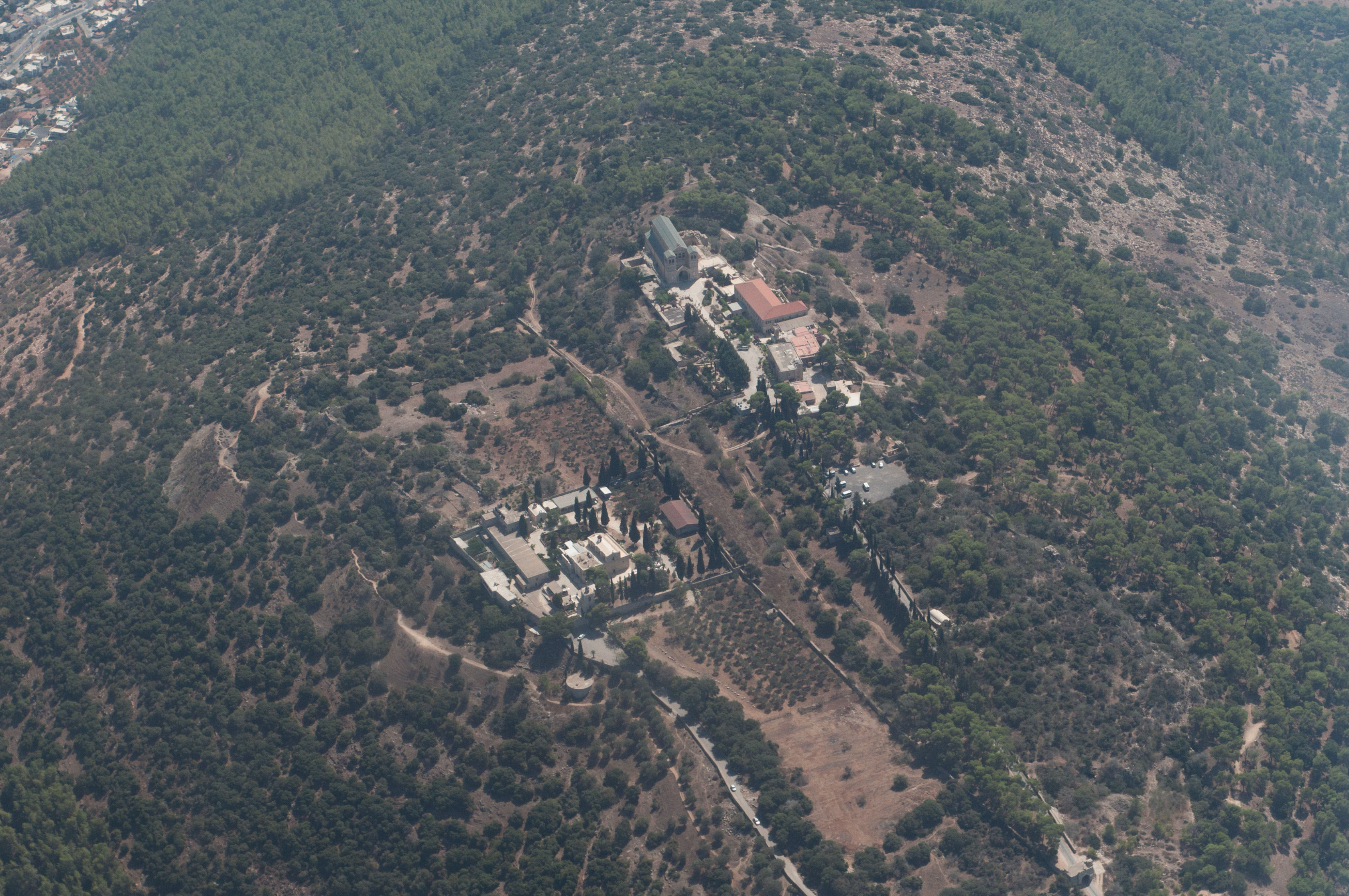 הר תבור